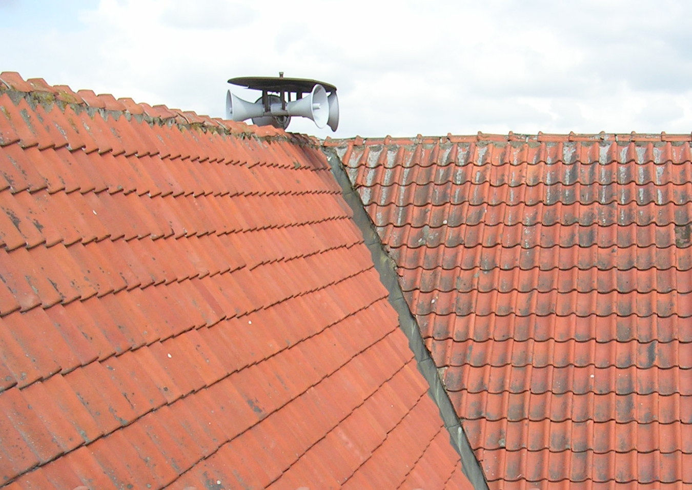 Kilgoot bij pannendak